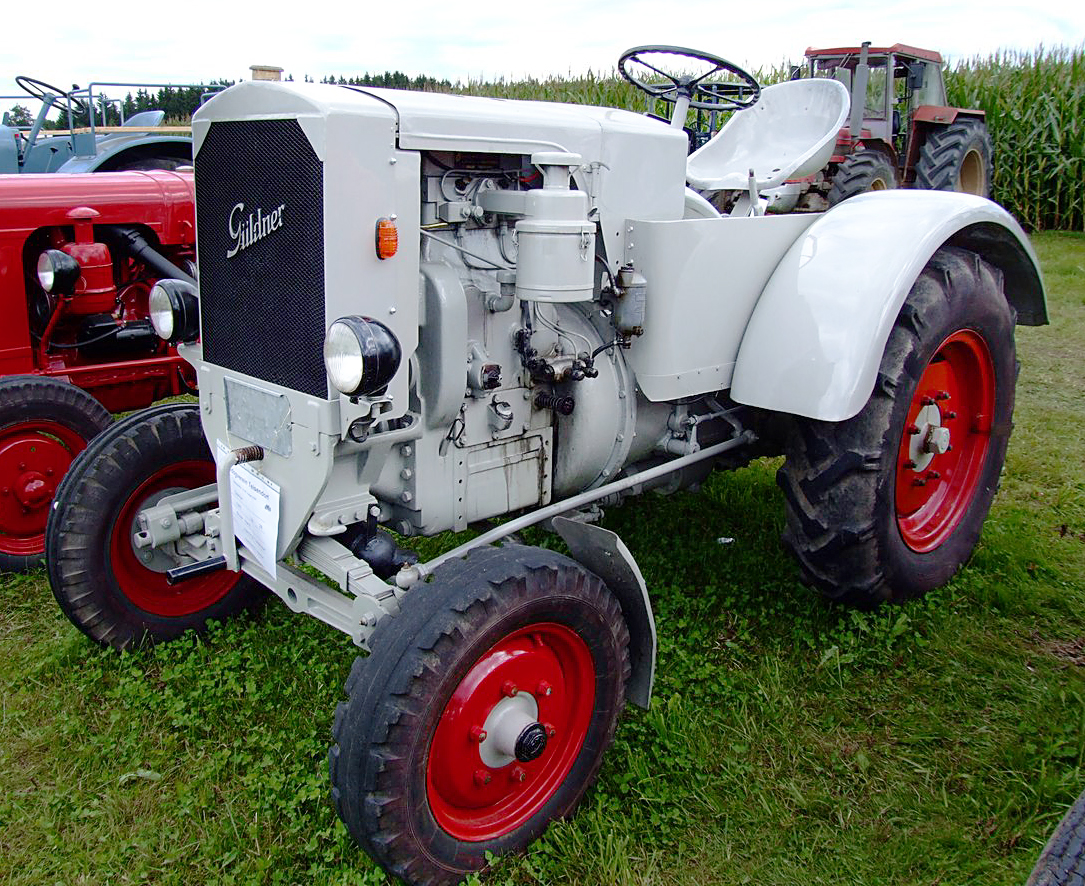 Güldner-Schlepper mit 28 PS, Baujahr 1948